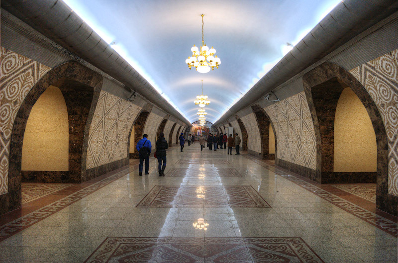 Интерьер станции Алмалы Алматинского метрополитена